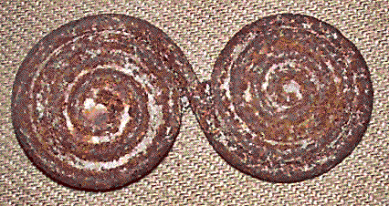 FIbula de anteojos del Bronce final centroeuropeo (Tracia)